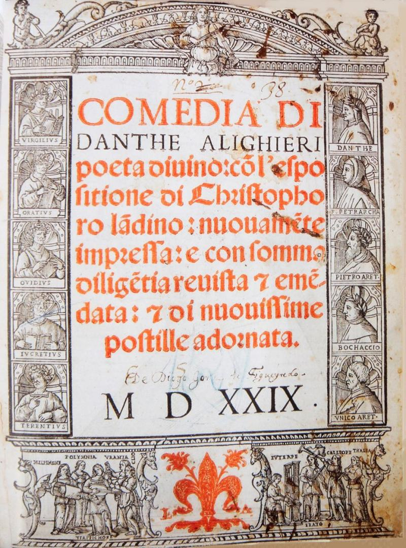 Dante Alighier (1265; 1321), Comedia di Danthe Alighieri poeta divino: cõ l'expositione di Christophoro lãdino: nuovamente impressa; e com somma dilligentia revista & emendata; & di novissime postile adornata. Venetia: Jacob del Burgofraco, 1529. Itália. Pub. in catálogo Veritatis, Art Auctioneers, Leilão XII, Livros e Manuscritos, n.º 79, Lisboa, 18 de julho de 2012, p. 23, Portugal (avaliado entre 2.500 e 5.000 euros).